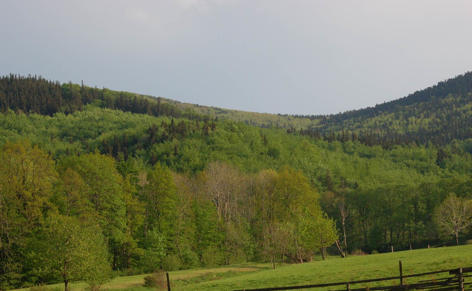 Sudety, Góry Sowie.